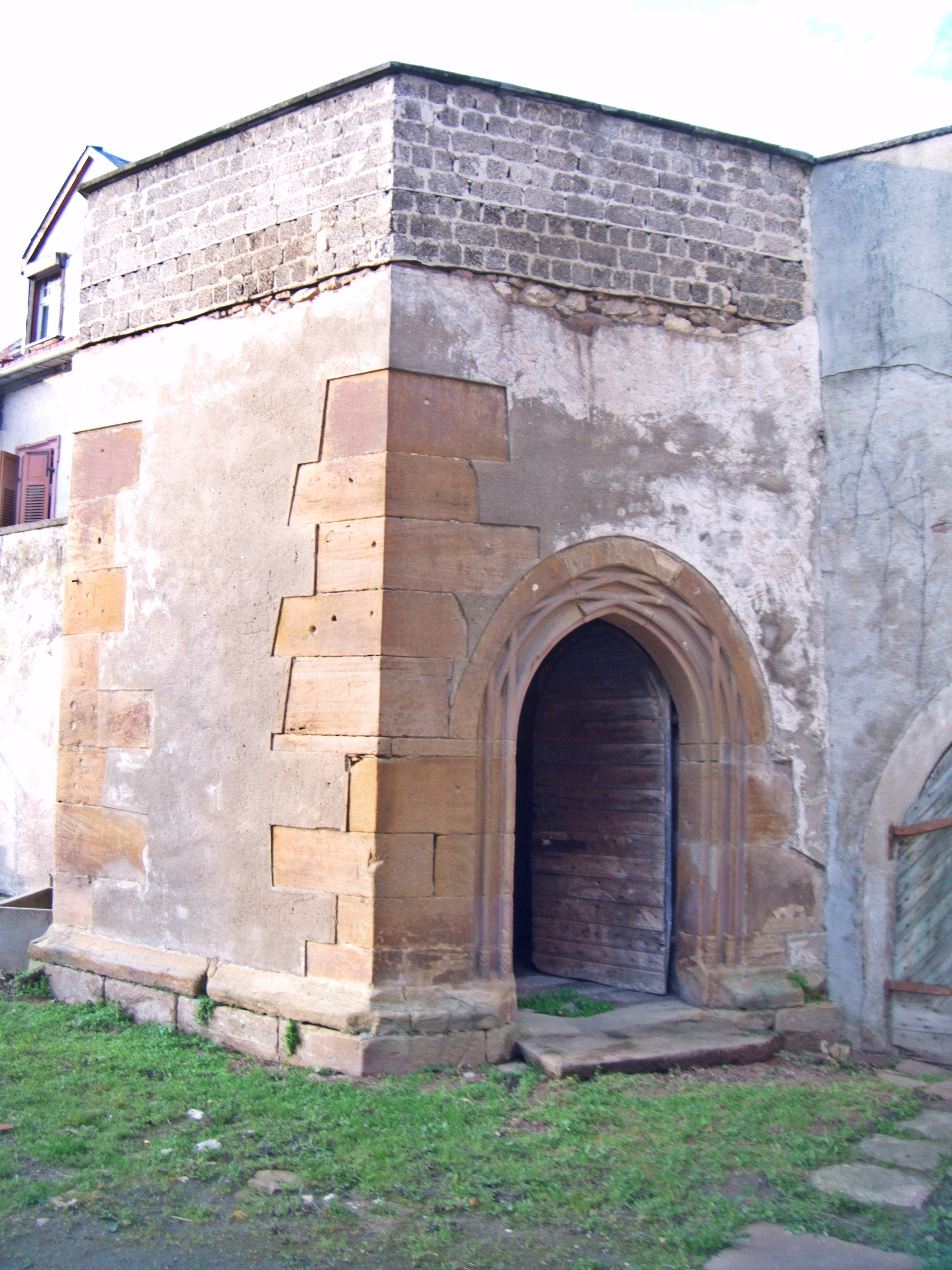 Dirmstein, Bischöfliches Schloss. Spätgotischer Stumpf des Treppenturmes vom Hauptgebäude